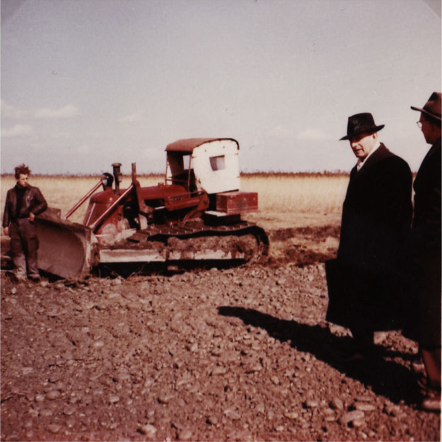 Bau des Polderdammes (Hochwasserschutzdamm) am südlichen Ufer des Bodensees, Fußach, Österreich 1956 - 1963